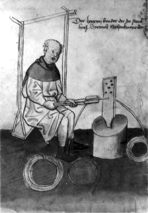 Monje reducción la sección del cable